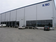 Centrala R.TEC -Polska, Reguły ul. Regulska 2c 05-820 Piastów